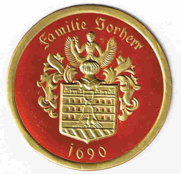 Beschreibung: Wappen der Fam. Vorherr von 1690 Quelle: Familie Vorherr Entstehungsdatum: 1690 Autor: Unbekannt